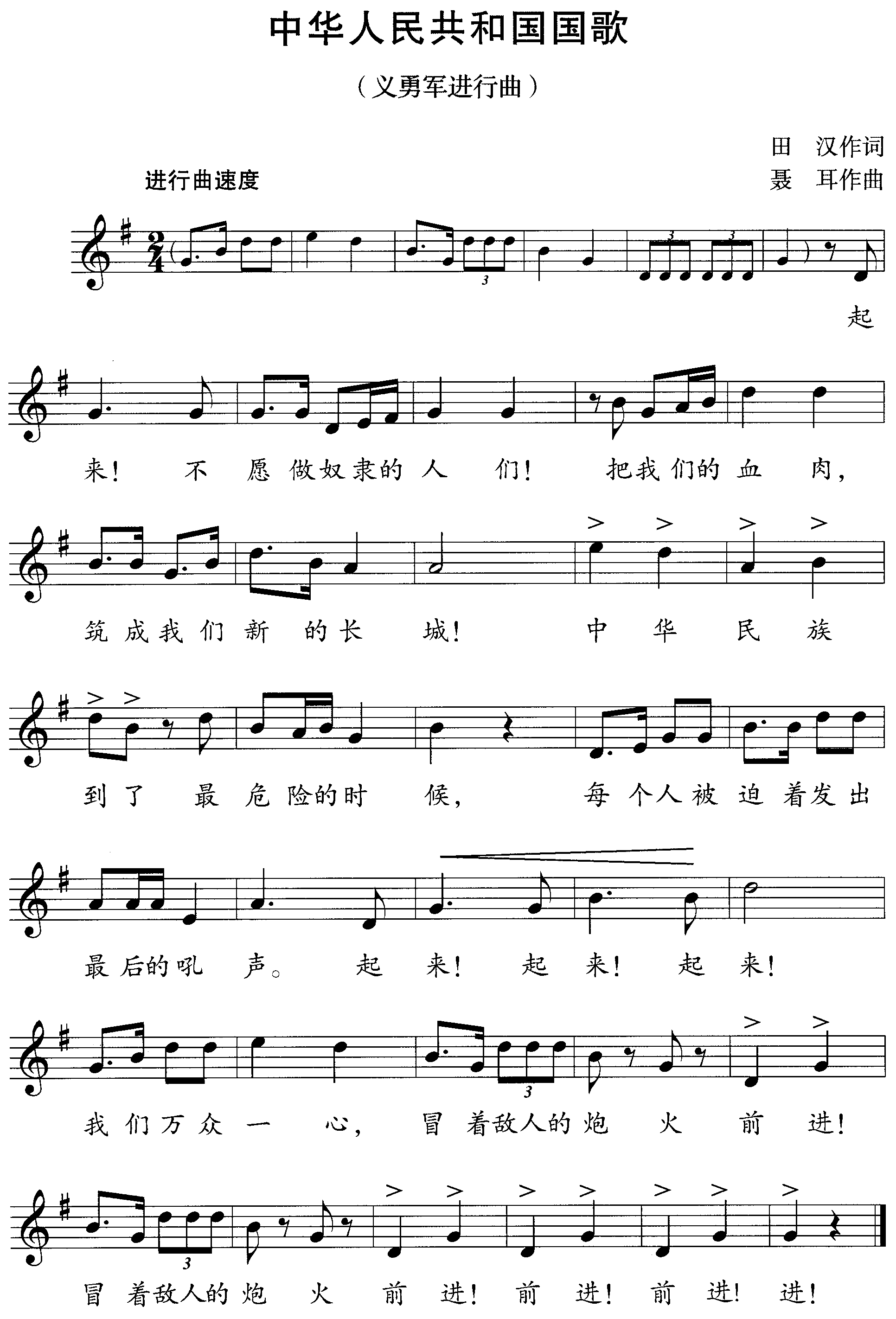 中华人民共和国国歌《义勇军进行曲》的标准演奏曲谱（五线谱版）。